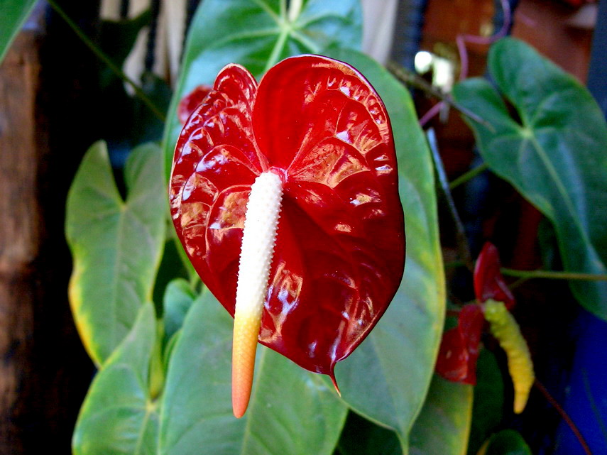 Anthurium andreanum en Santa Rosa de Capanaparo, estado Apure - Venezuela